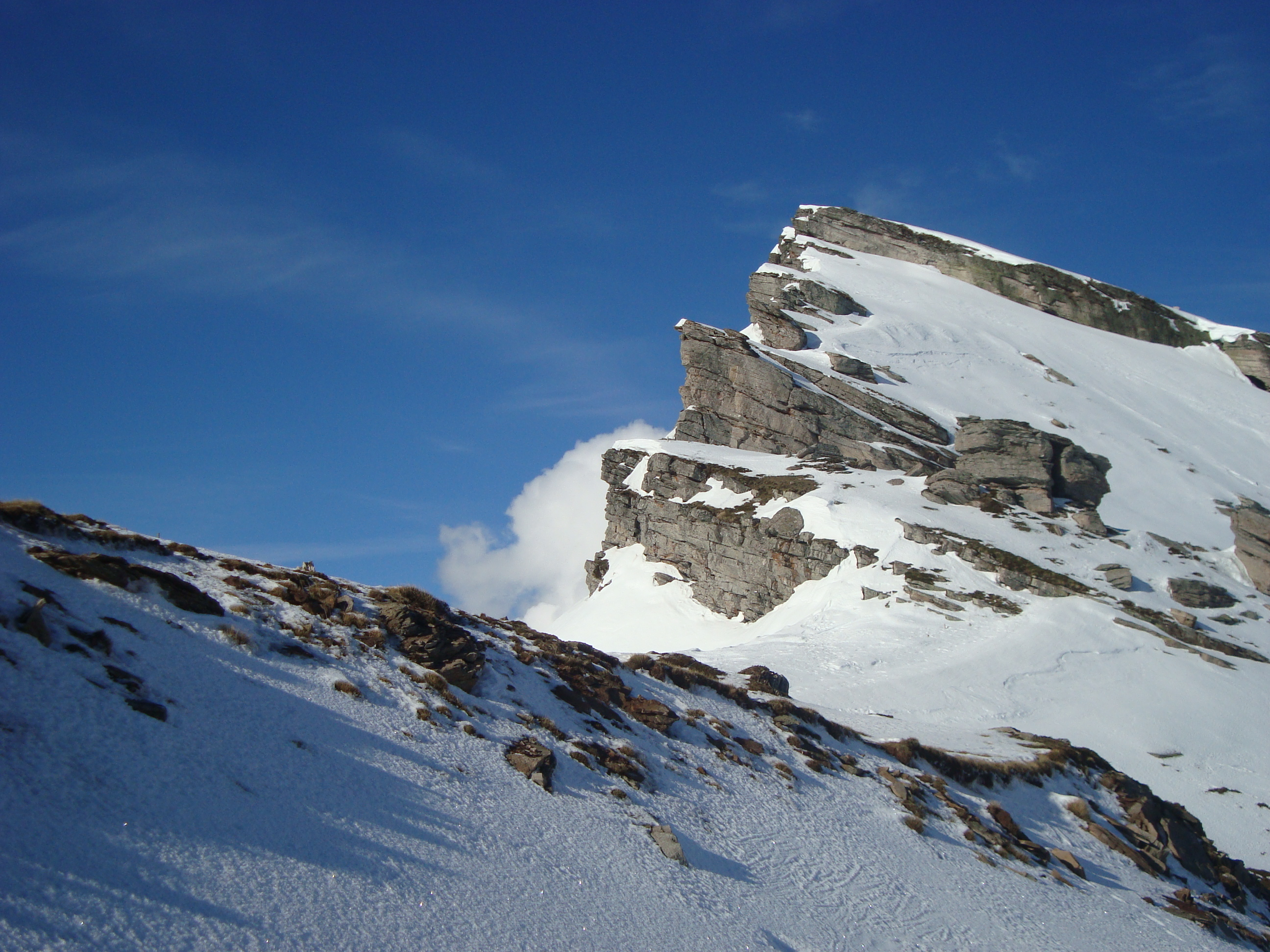 Pico Tres Mares, en el límite entre Cantabria y la provincia de Palencia (España).